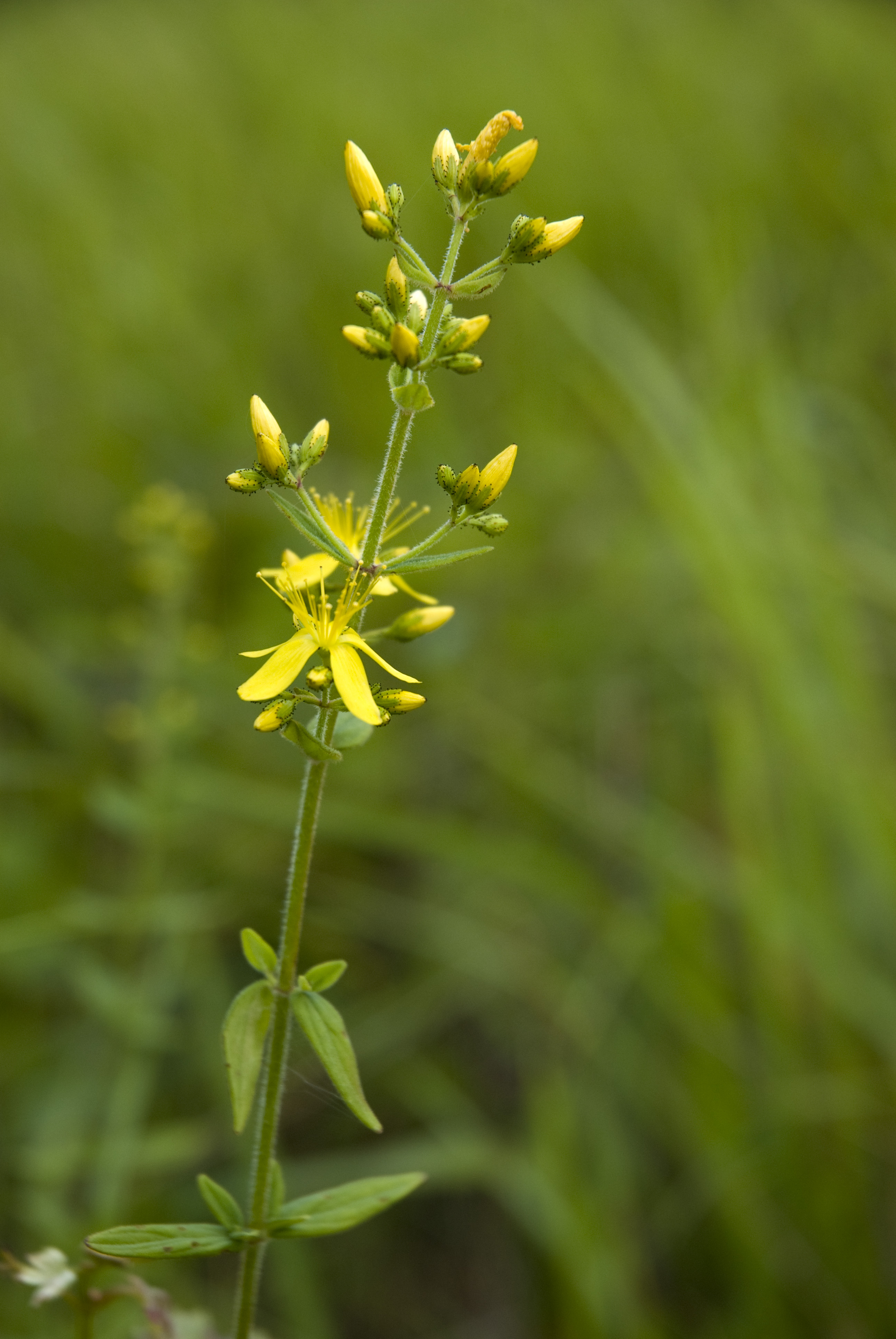 Hypericum hirsutum Coteau de Chartèves (Aisne), France